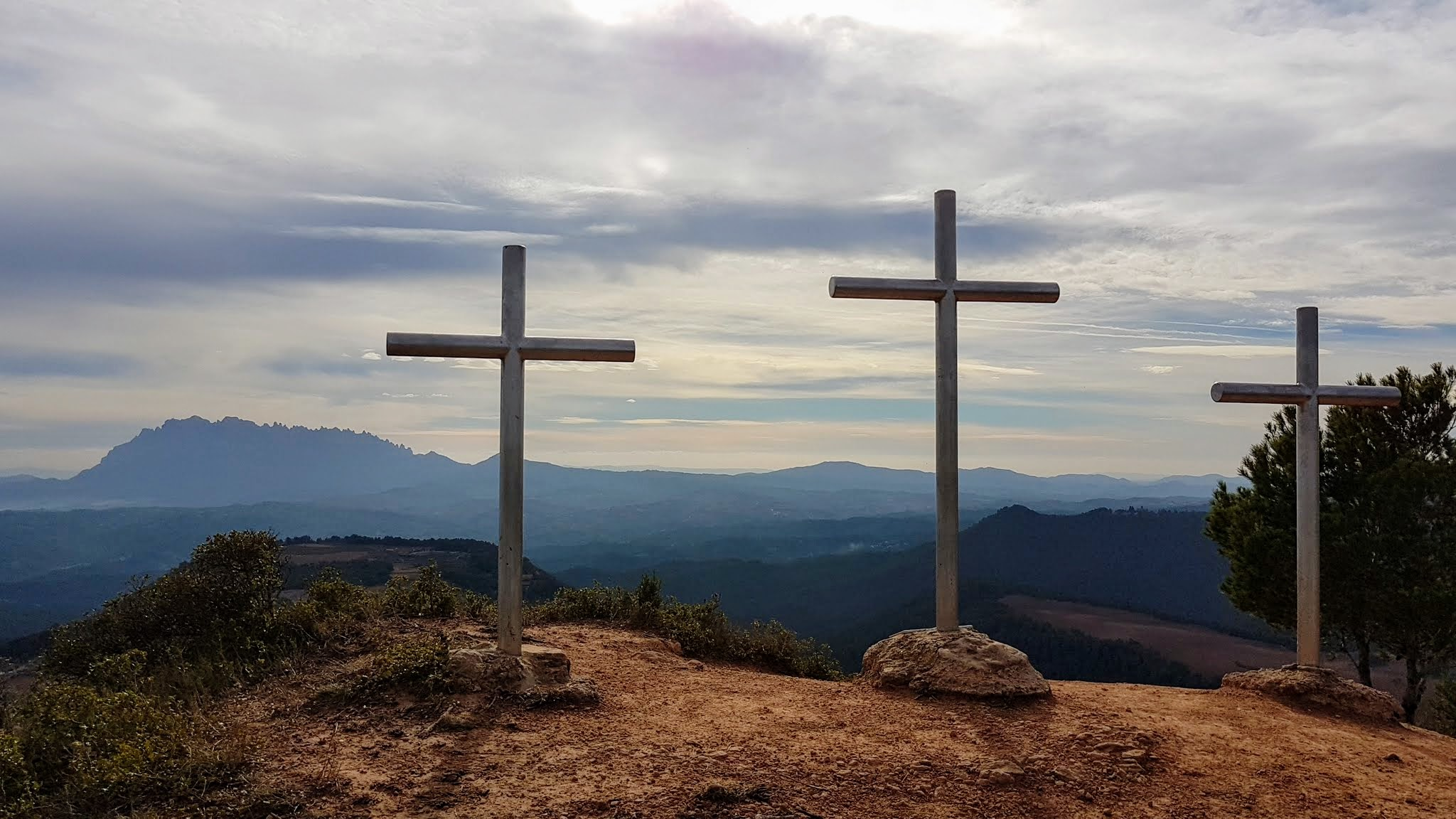 Cim del Turó de les Tres Creus